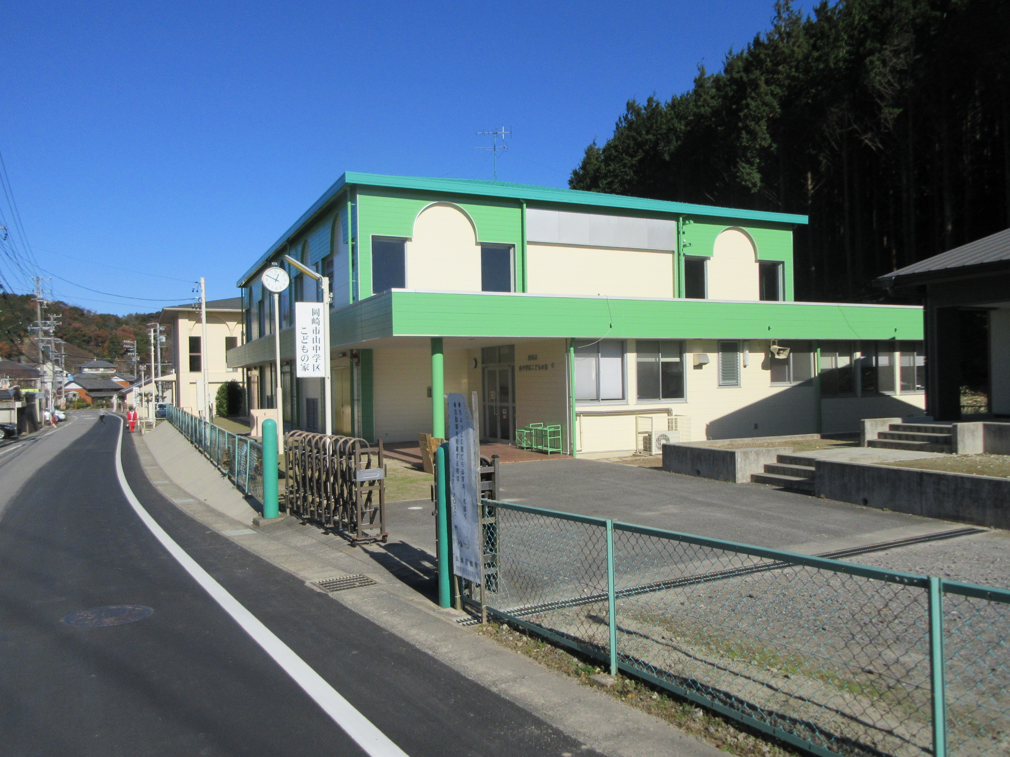 岡崎市山中学区こどもの家（岡崎市山綱町）